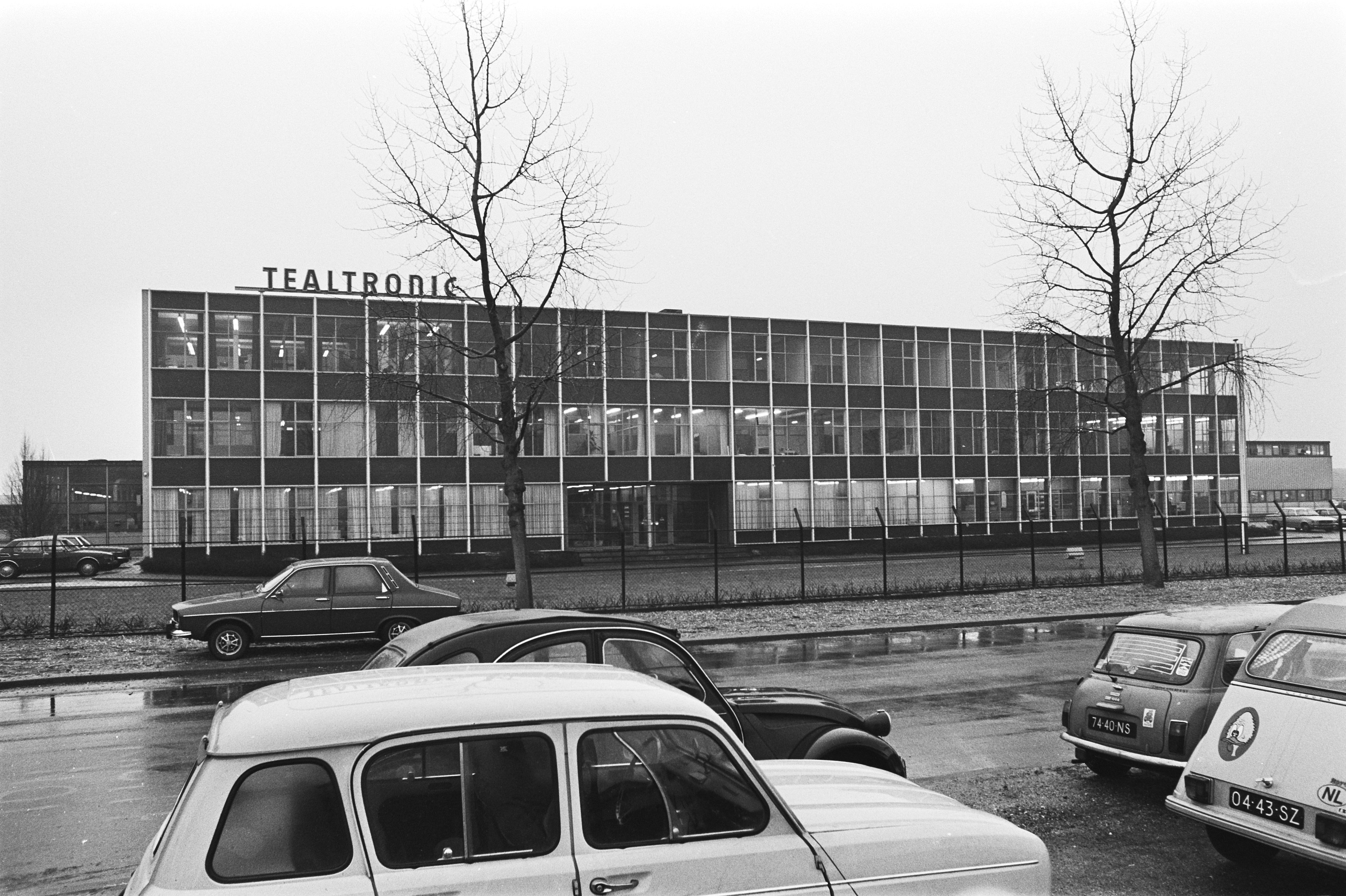 Collectie / Archief : Fotocollectie Anefo Reportage / Serie : [ onbekend ] Beschrijving : Nijmeegse bedrijf Tealtronic mag niet meer rekenen op overheidssteun Datum : 6 januari 1977 Trefwoorden : bedrijven Instellingsnaam : Tealtronic Fotograaf : Peters, Hans / Anefo Auteursrechthebbende : Nationaal Archief Materiaalsoort : Negatief (zwart/wit) Nummer archiefinventaris : bekijk toegang 2.24.01.05 Bestanddeelnummer : 928-9666